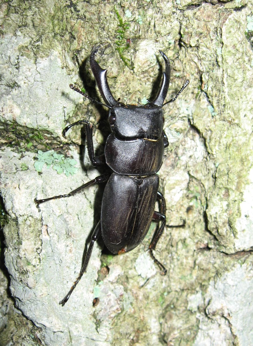 コクワガタ (Dorcus rectus)